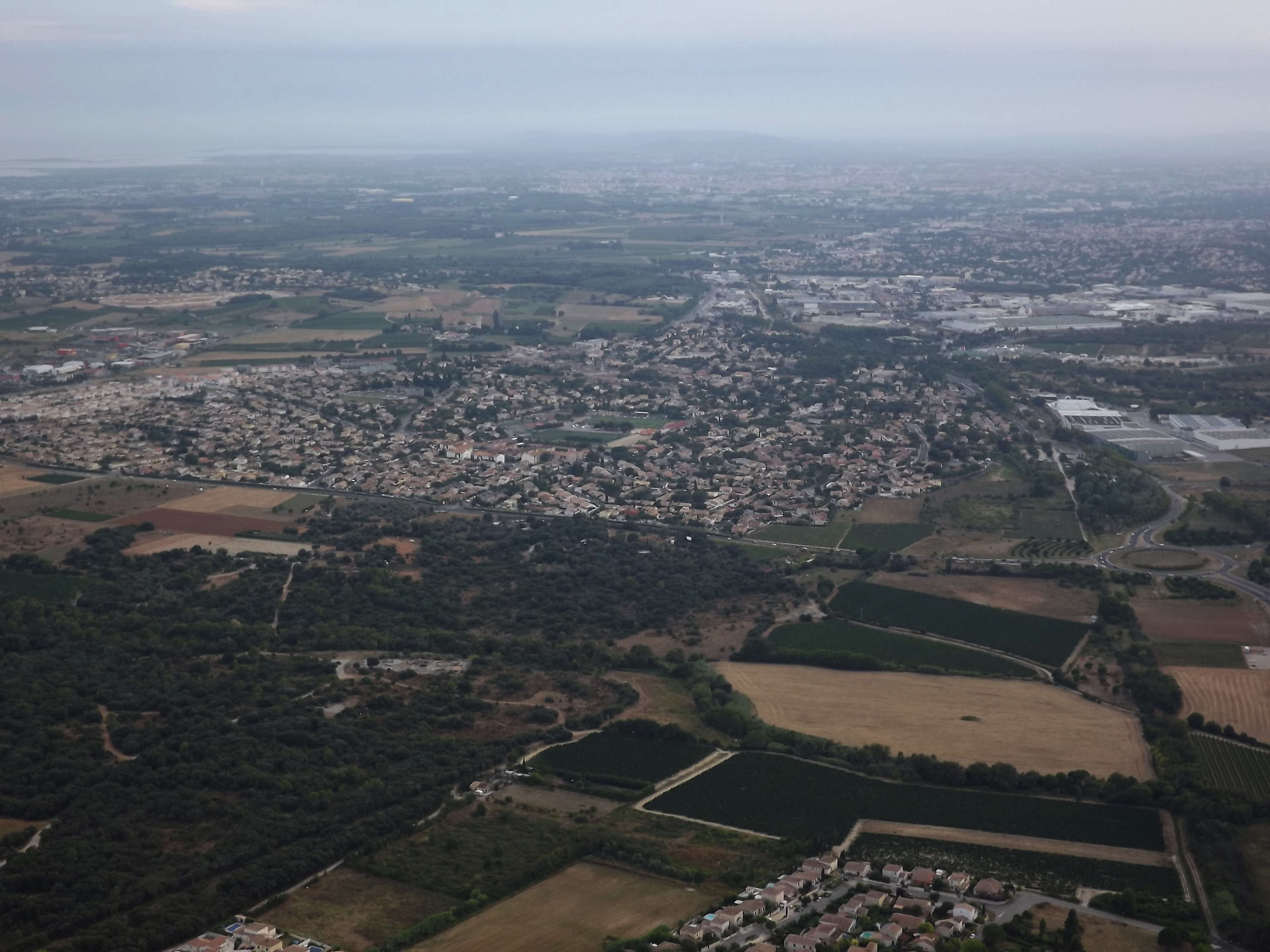 Vue aérienne